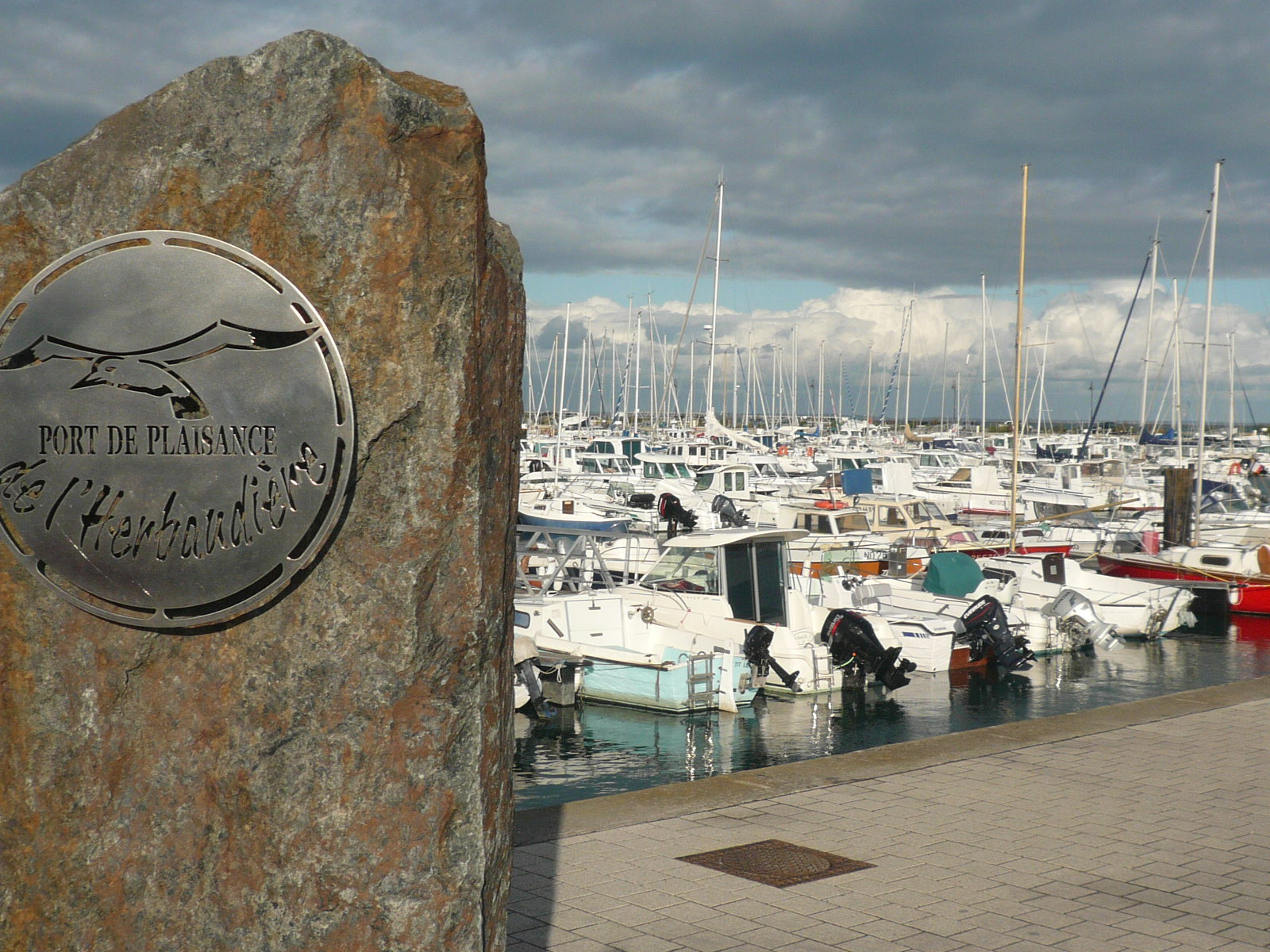 Port de plaisance de l'Herbaudière